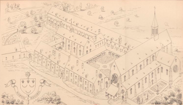 Croquis de reconstitution des bâtiments conventuelles et de l'église de l'abbaye des Vaux-de-Cernay